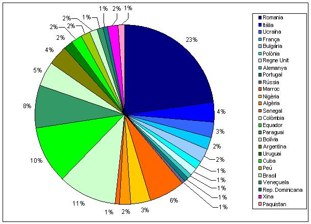 Distribució per nacionalitats del immigrants a Burjassot (2009). Font: INE